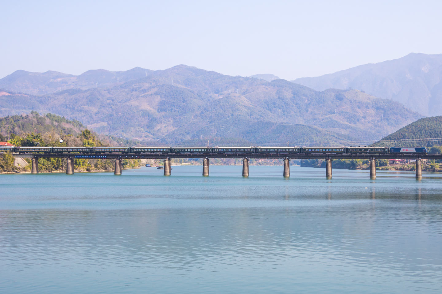 中文（中国大陆）: K945次列车驶过鹰厦铁路位于来舟的一段桥梁